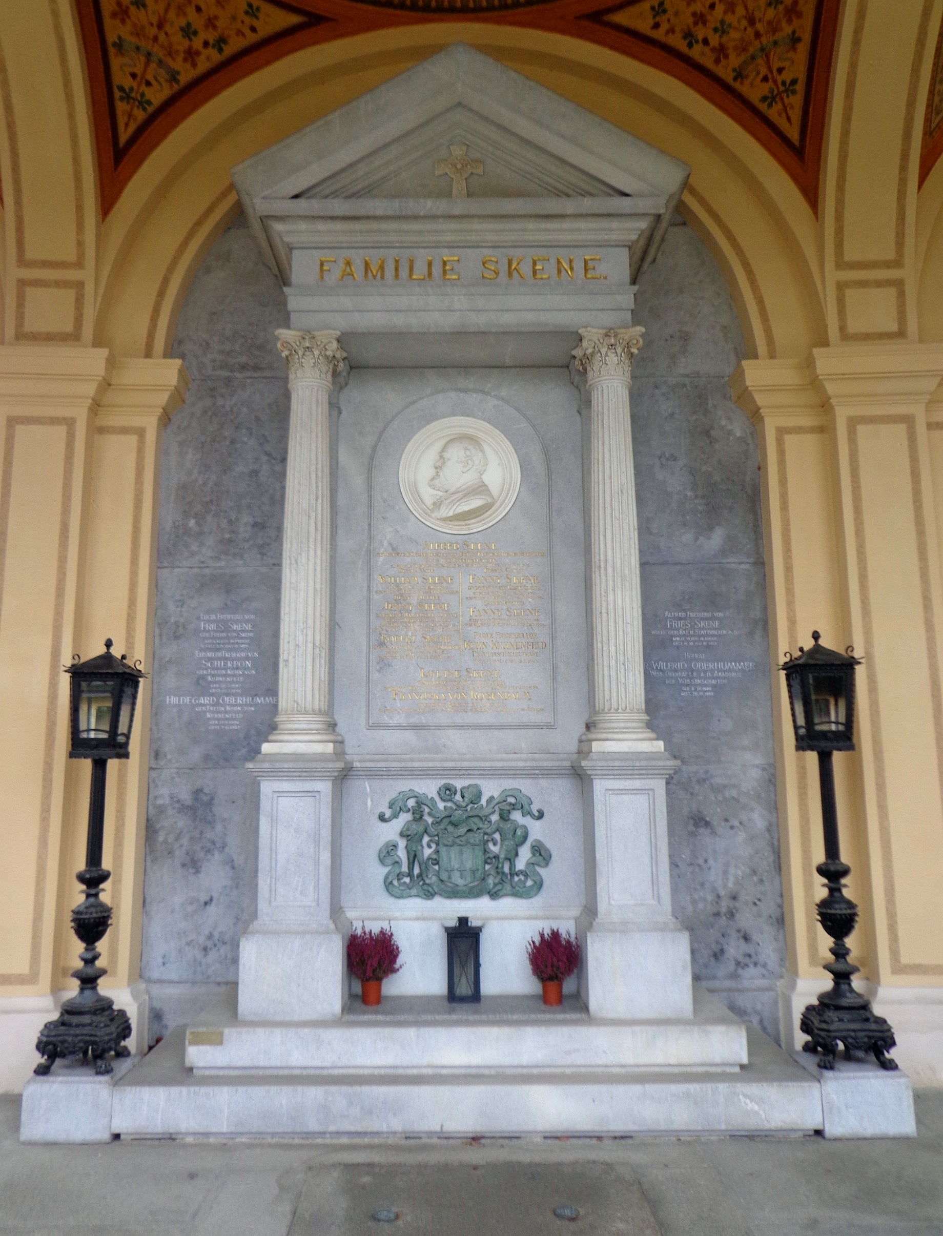 Wiener Zentralfriedhof, Alte Arkaden, Gruft Nr. 9: Grabstätte der Familie Skene